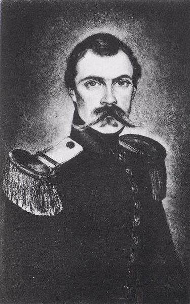 Autoportrait de Lucien de Montagnac (1803-1845)